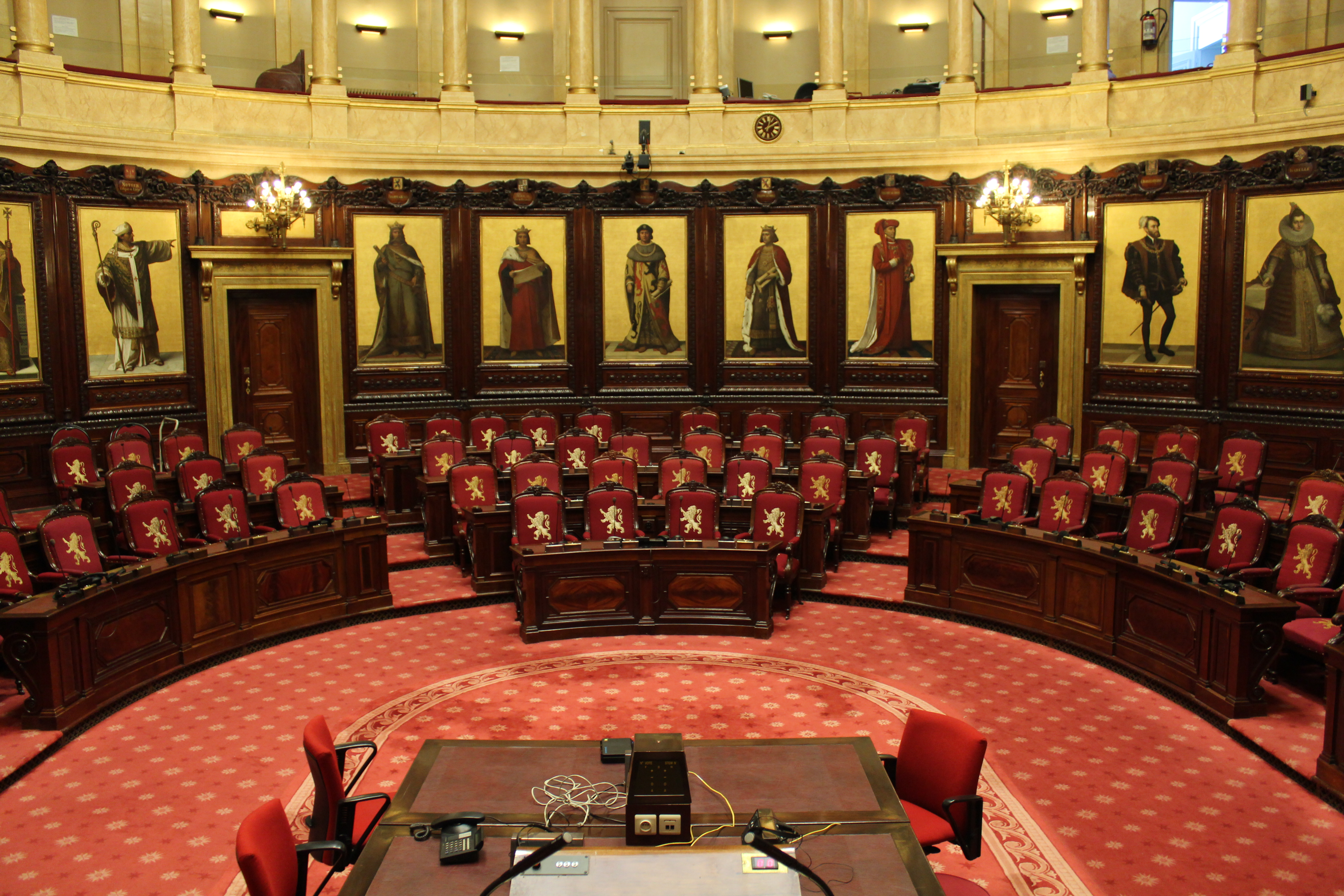 Hémicycle du Sénat Belge, vu depuis la Tribune du président.